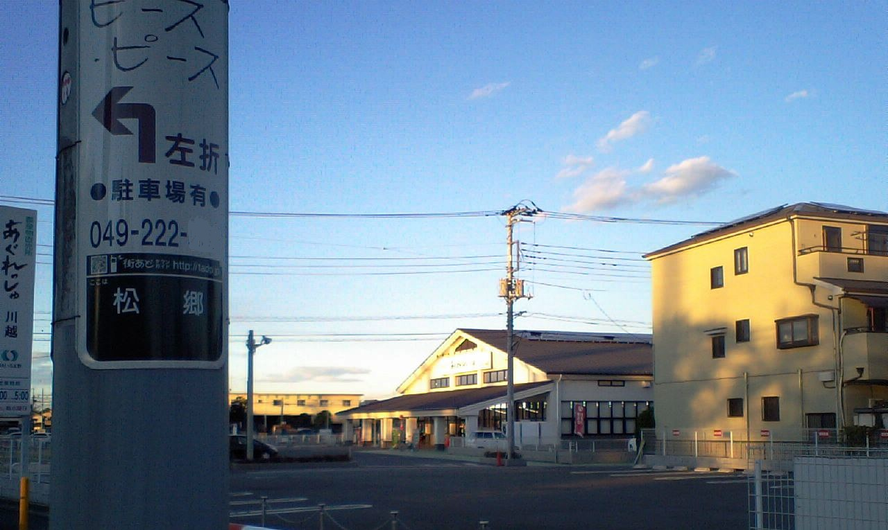 埼玉県川越市松郷。国道254号線から北東側を撮影。